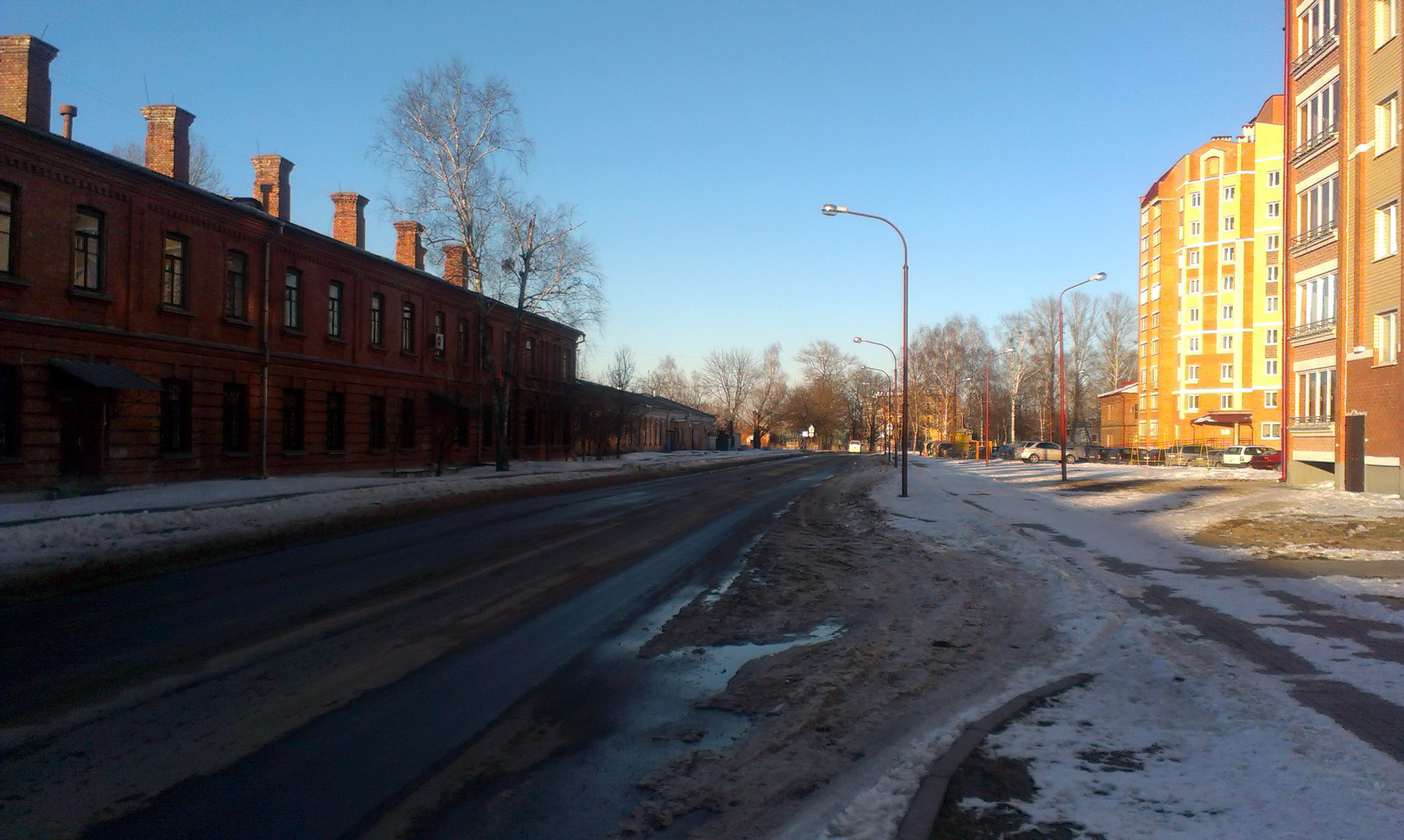 Вул. Гурава